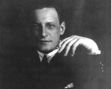 Karel Poláček (1892 - 1945), Československý spisovatel, humorista a novinář.